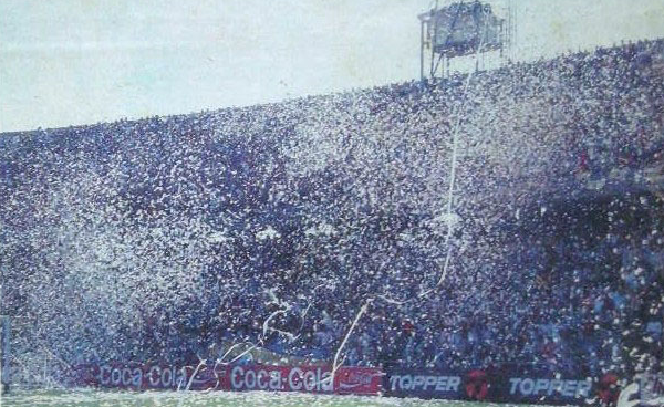 Tribuna popular de Rosario Central durante el partido frente a Newell's del 23 de abril de 1989.